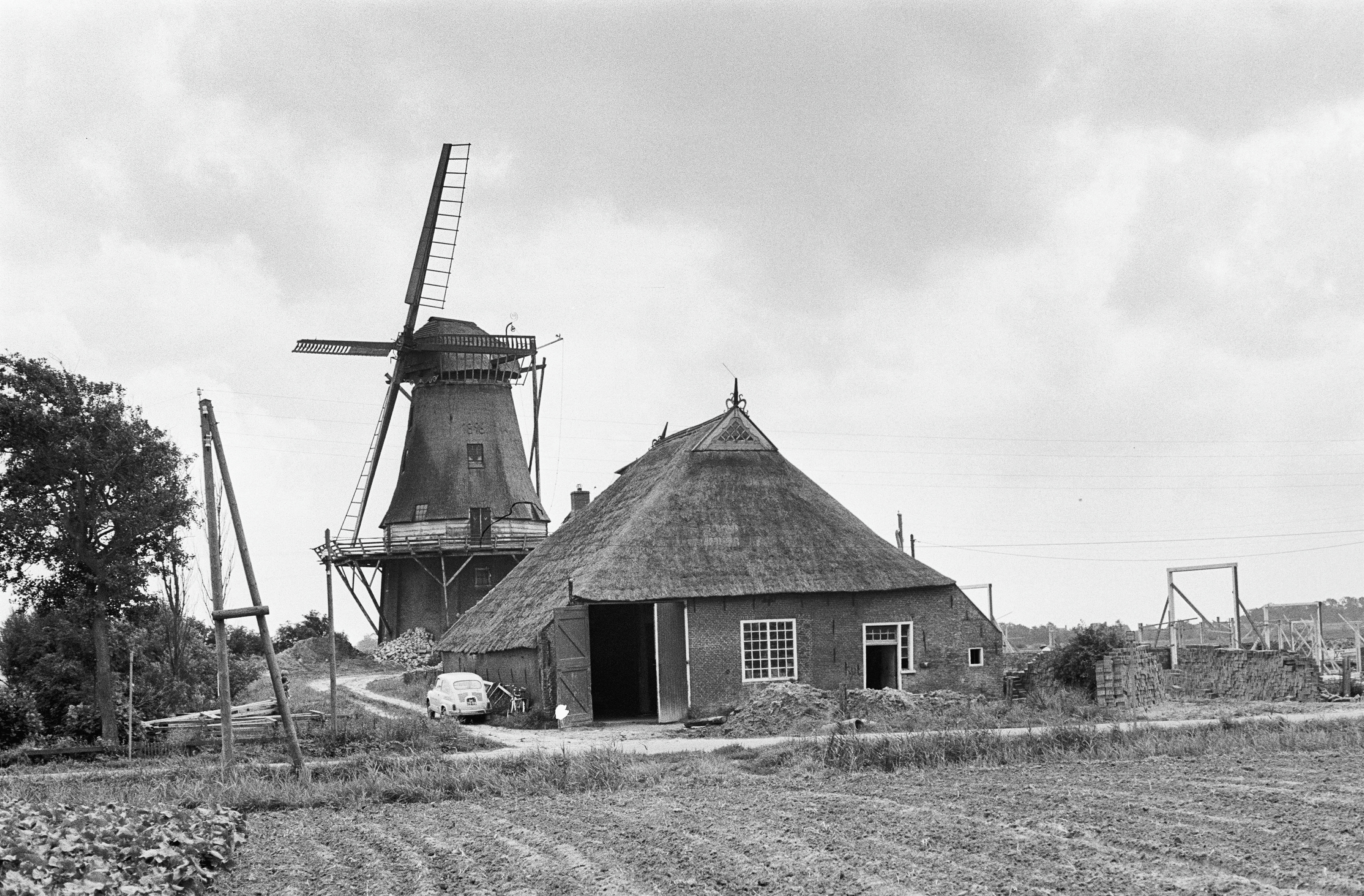 Korenmolen